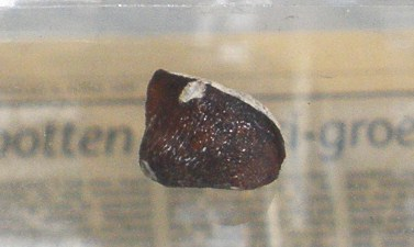 Fossil of Carinodens, an extinct mosasaur- Took the photo at De Groene Poort, Boxtel